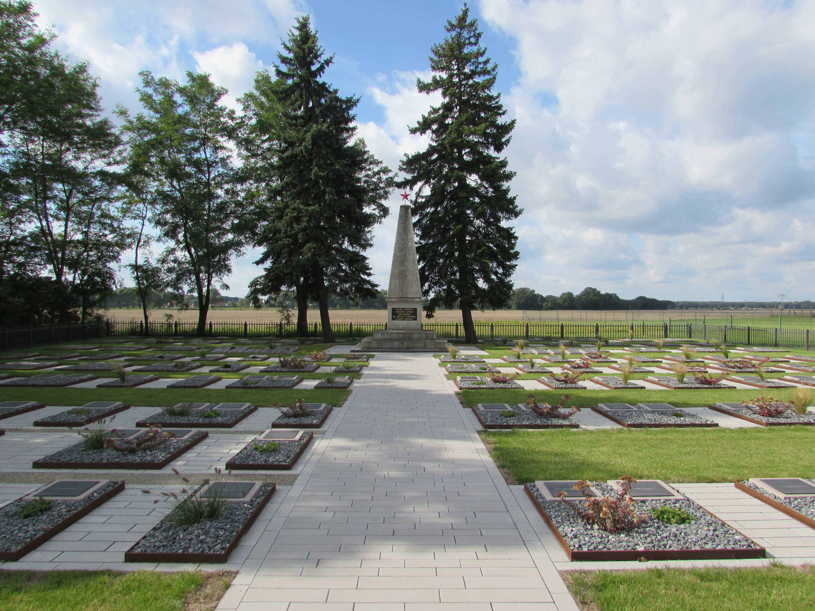 sowjetischer soldatenfriedhof brielow